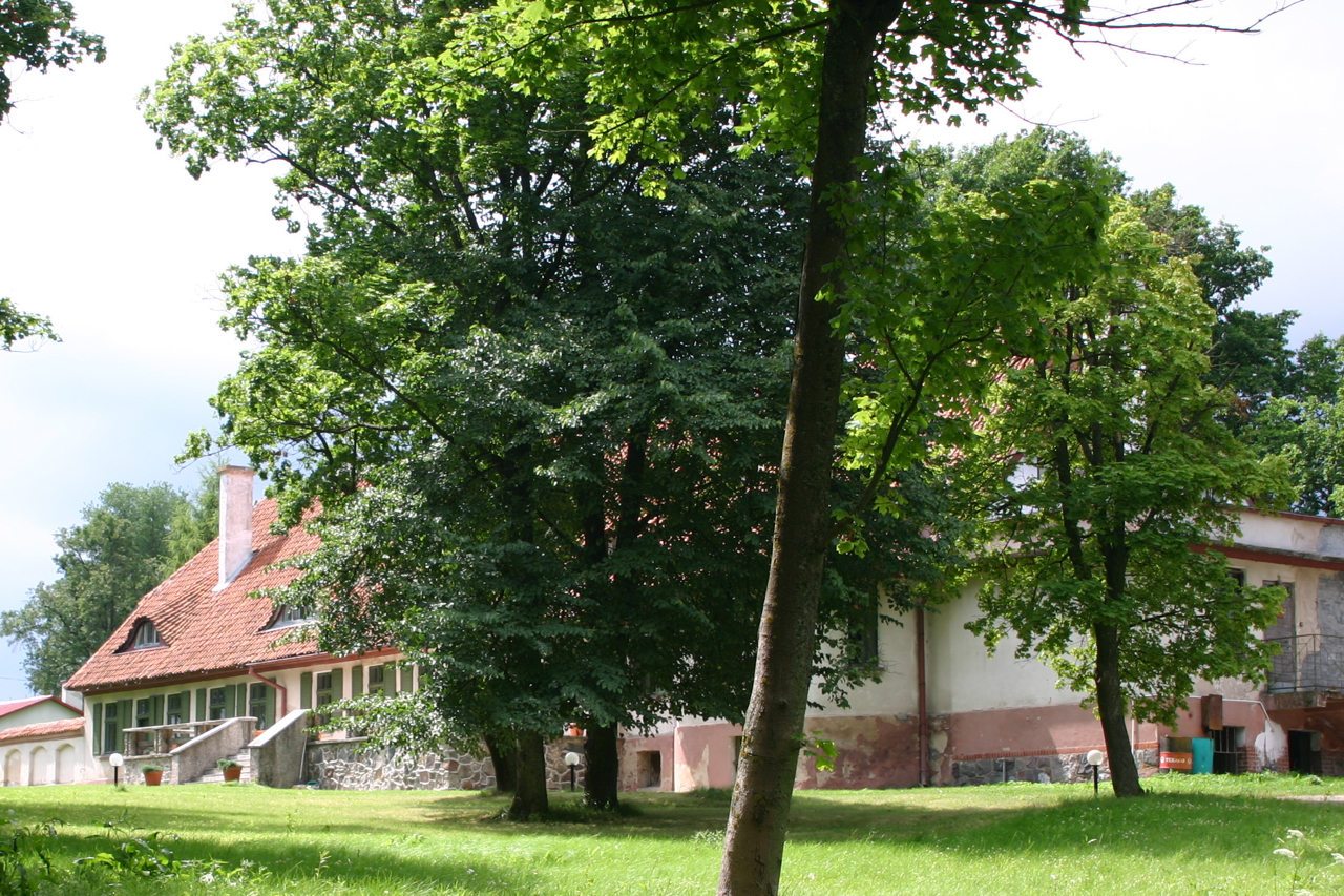 Solanka, Polska, powiat kętrzyński.